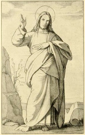 gefertigt für ein Gebetbuch von Anton Hungari, 1843